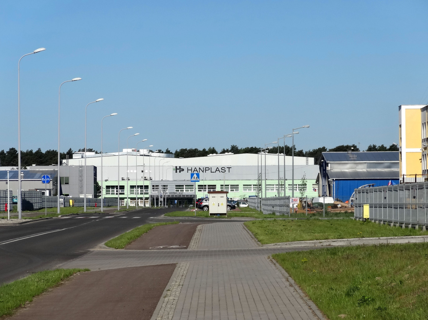 Przedsiębiorstwo Hanplast Sp. z o.o. na terenie Bydgoskiego Parku Przemysłowo-Technologicznego